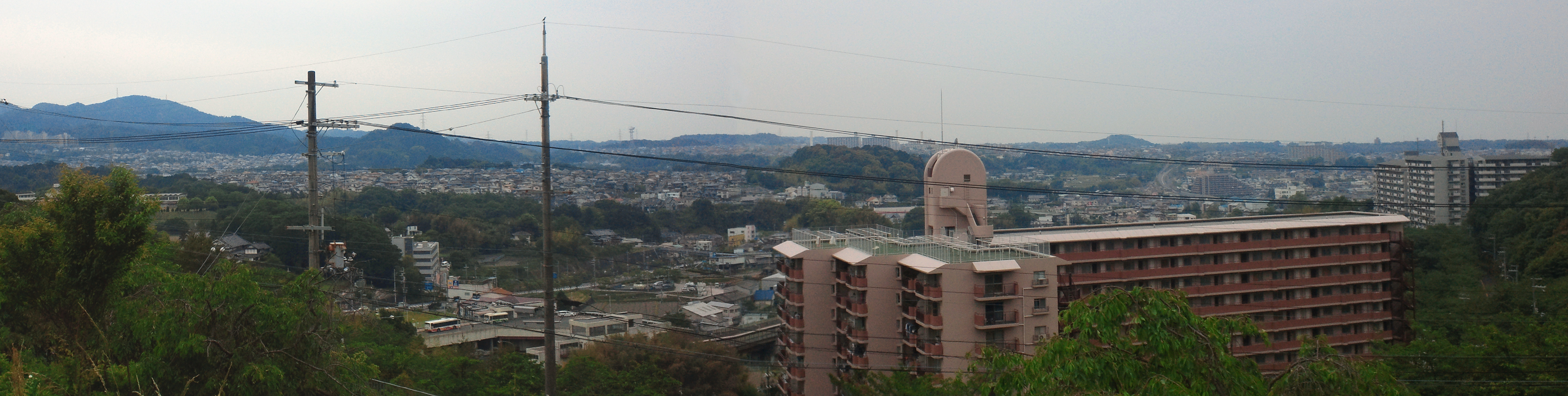 河内長野ニュータウン